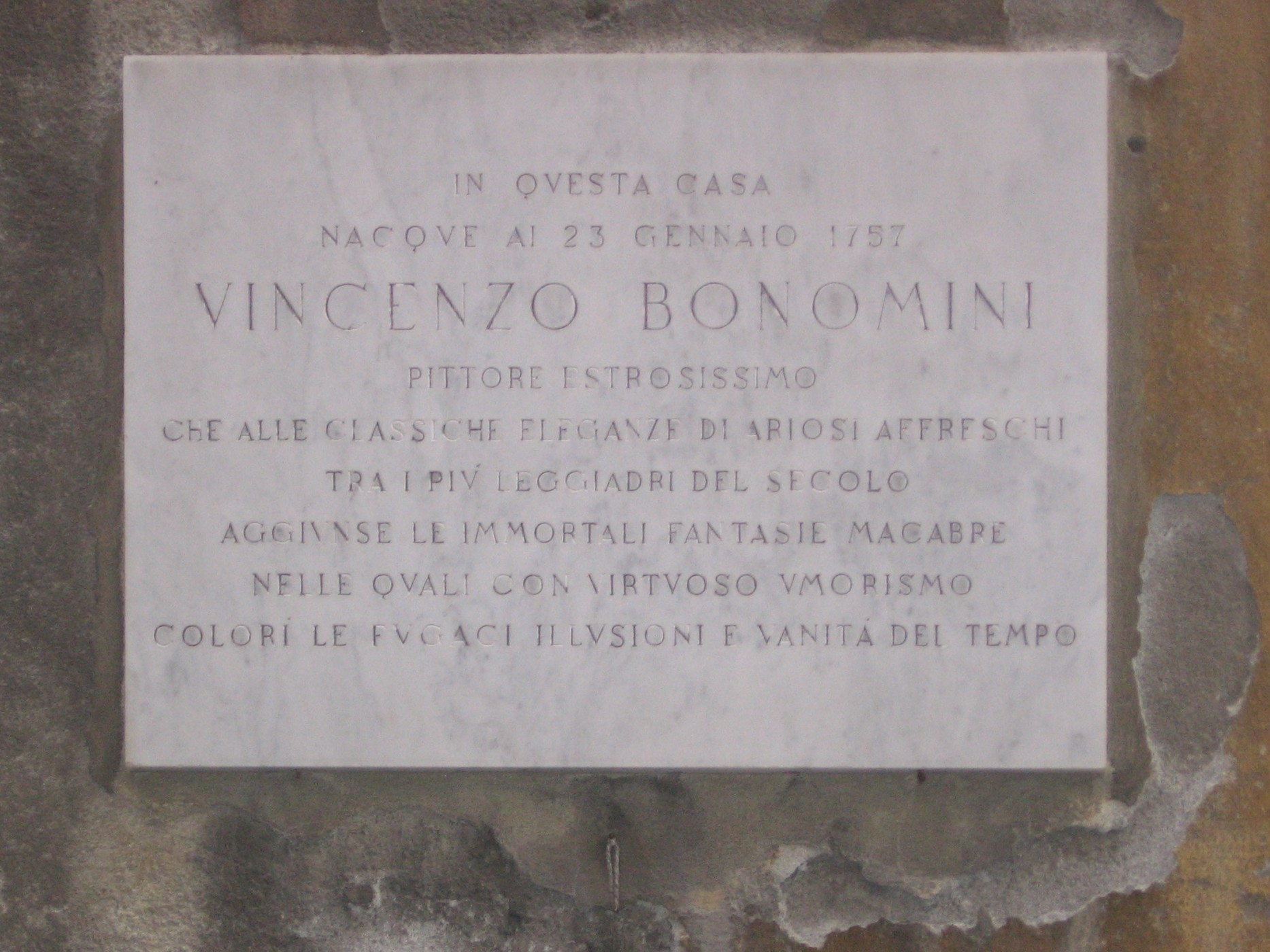 P.V. Bonomini, targa commemorativa, Bergamo, Italy.